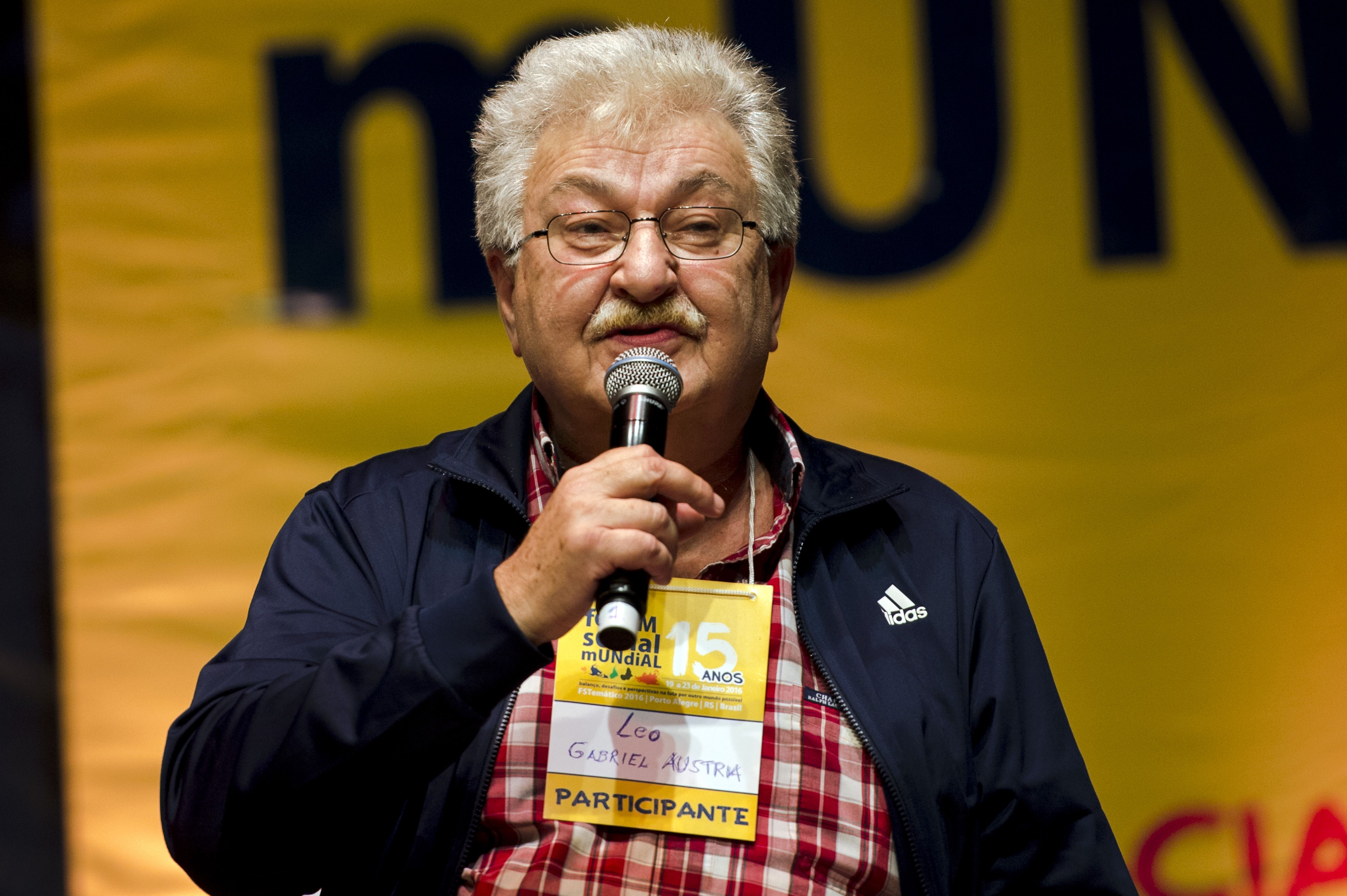 Porto Alegre - O jornalista austríaco Leo Gabriel em palestra sobre Globalização: Desigualdade e a Crise Civilizatória, no Fórum Social Temático.